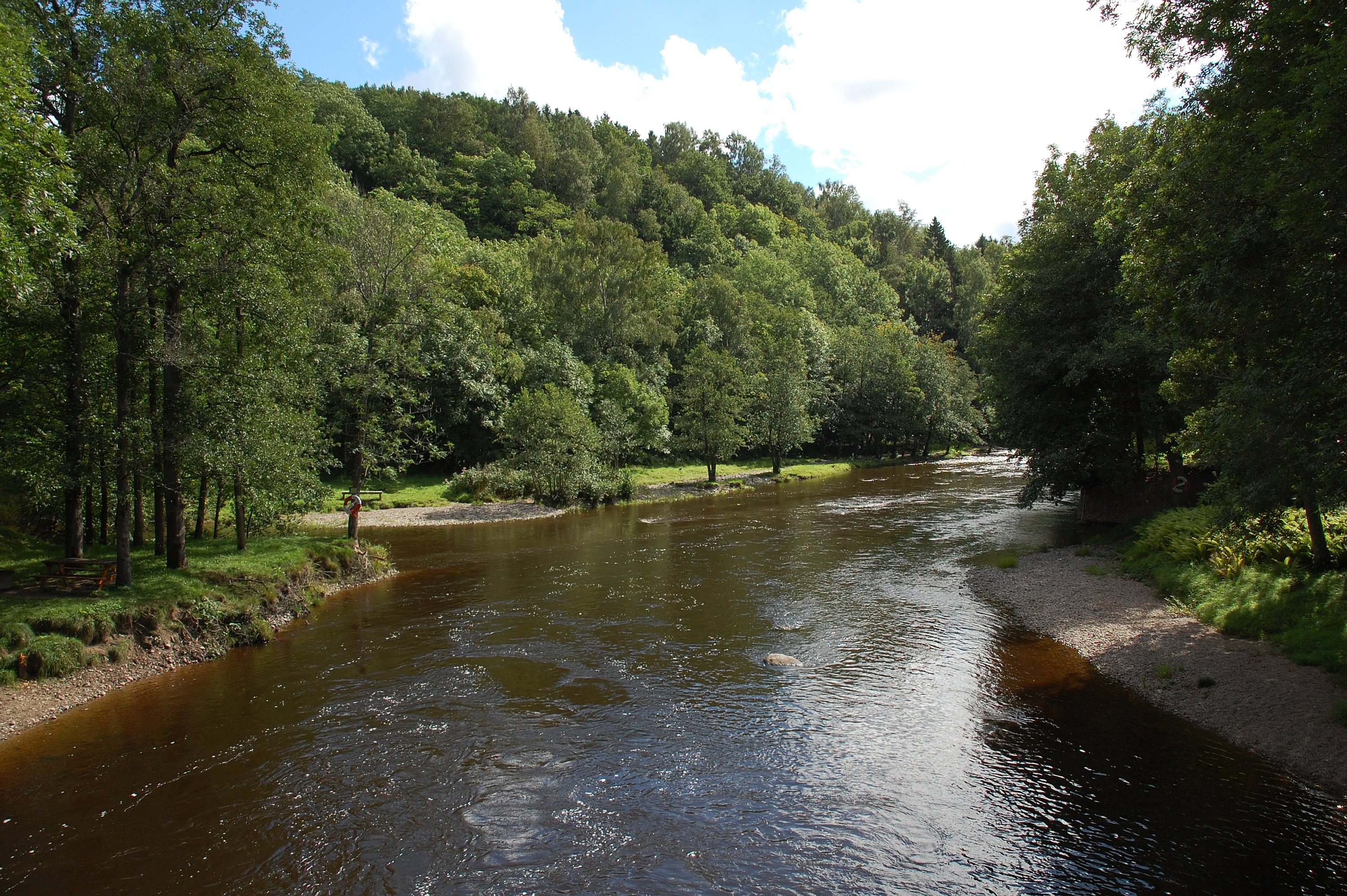 Örekilsälven i Munkedal